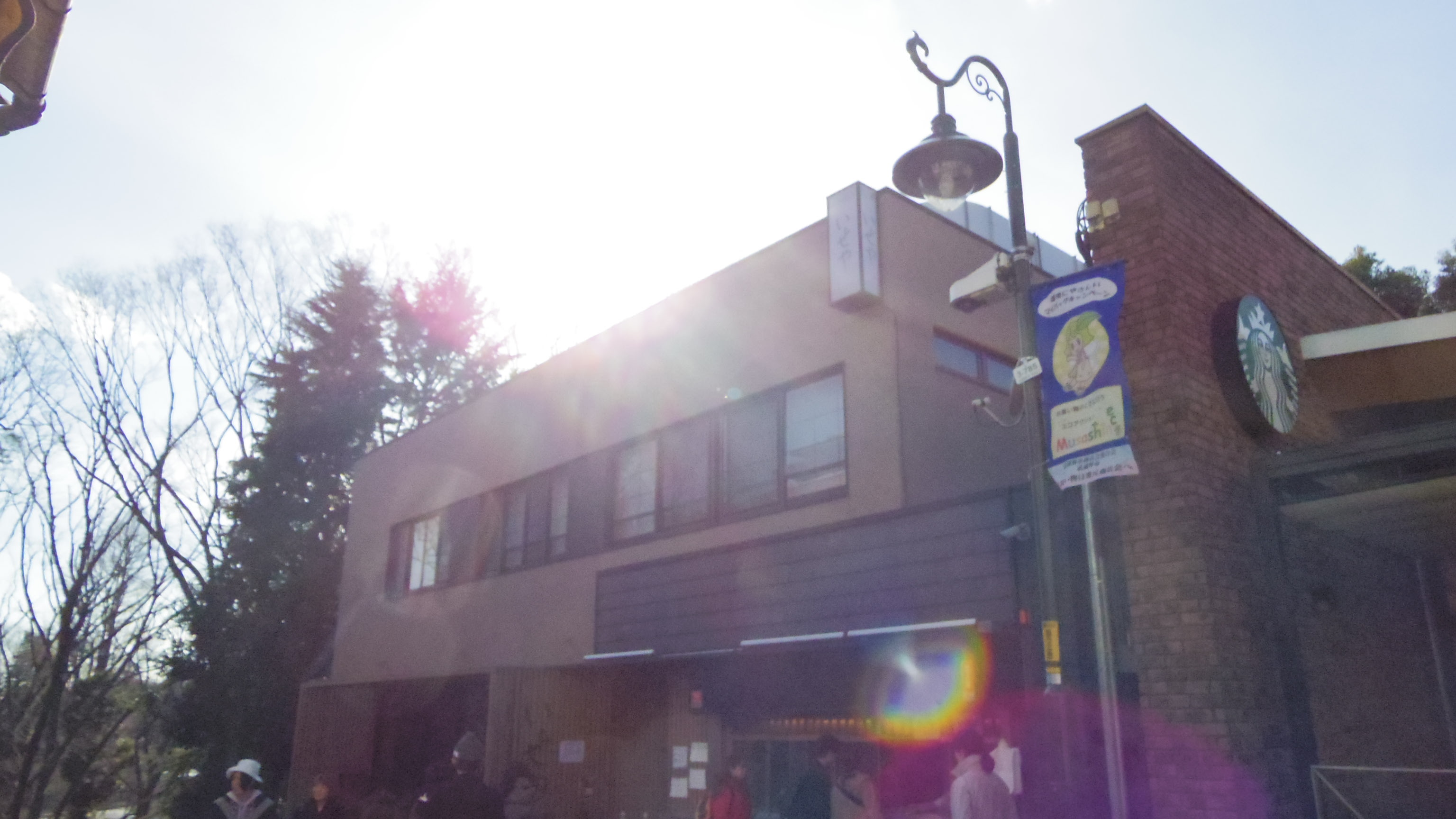 いせや公園店（東京都武蔵野市、井の頭恩賜公園前）。現在の店舗は2代目となる。